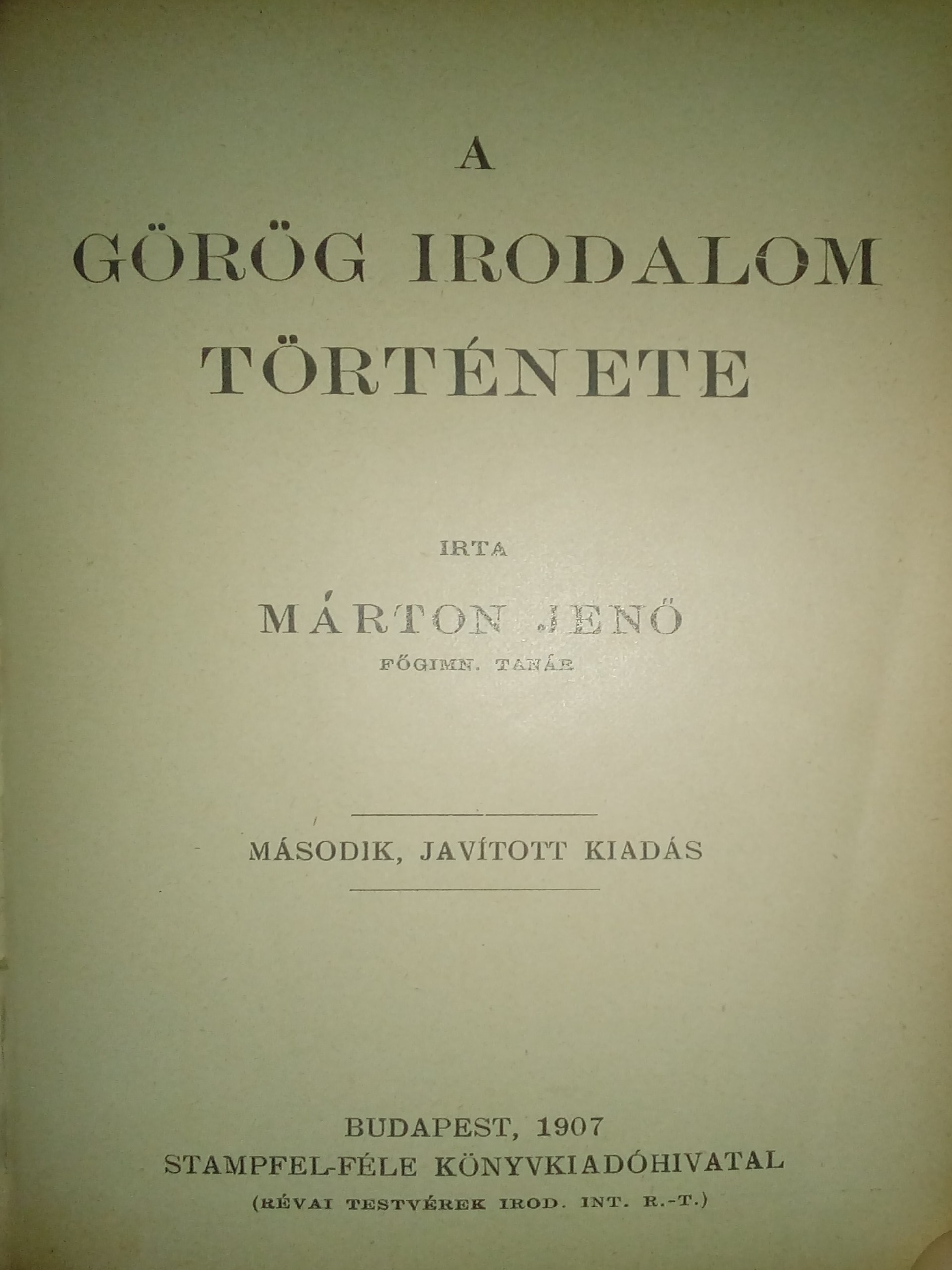 Az adott mű címlapja.